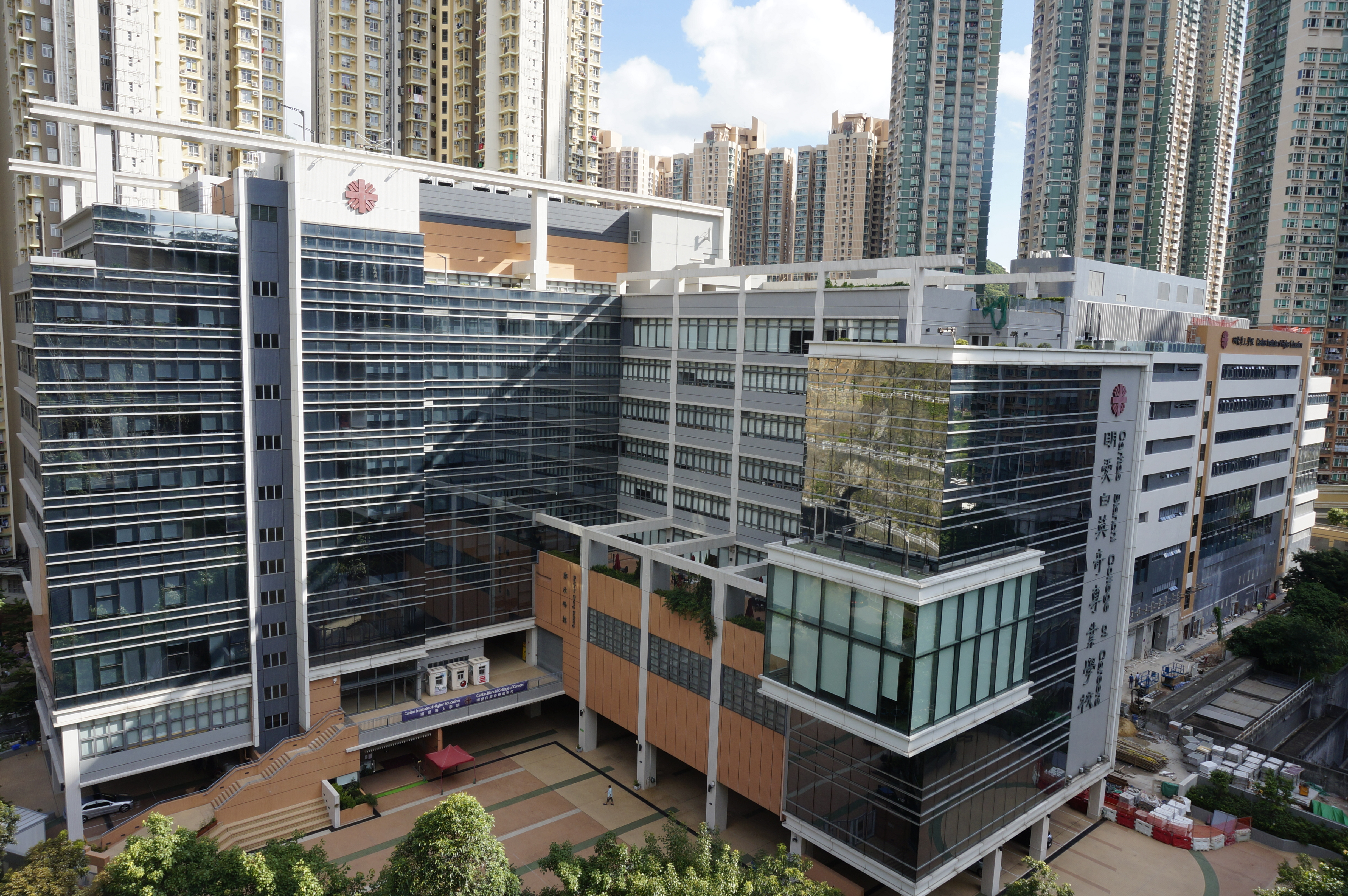 明愛英奇專業學校與明愛專上學院調景嶺校舍